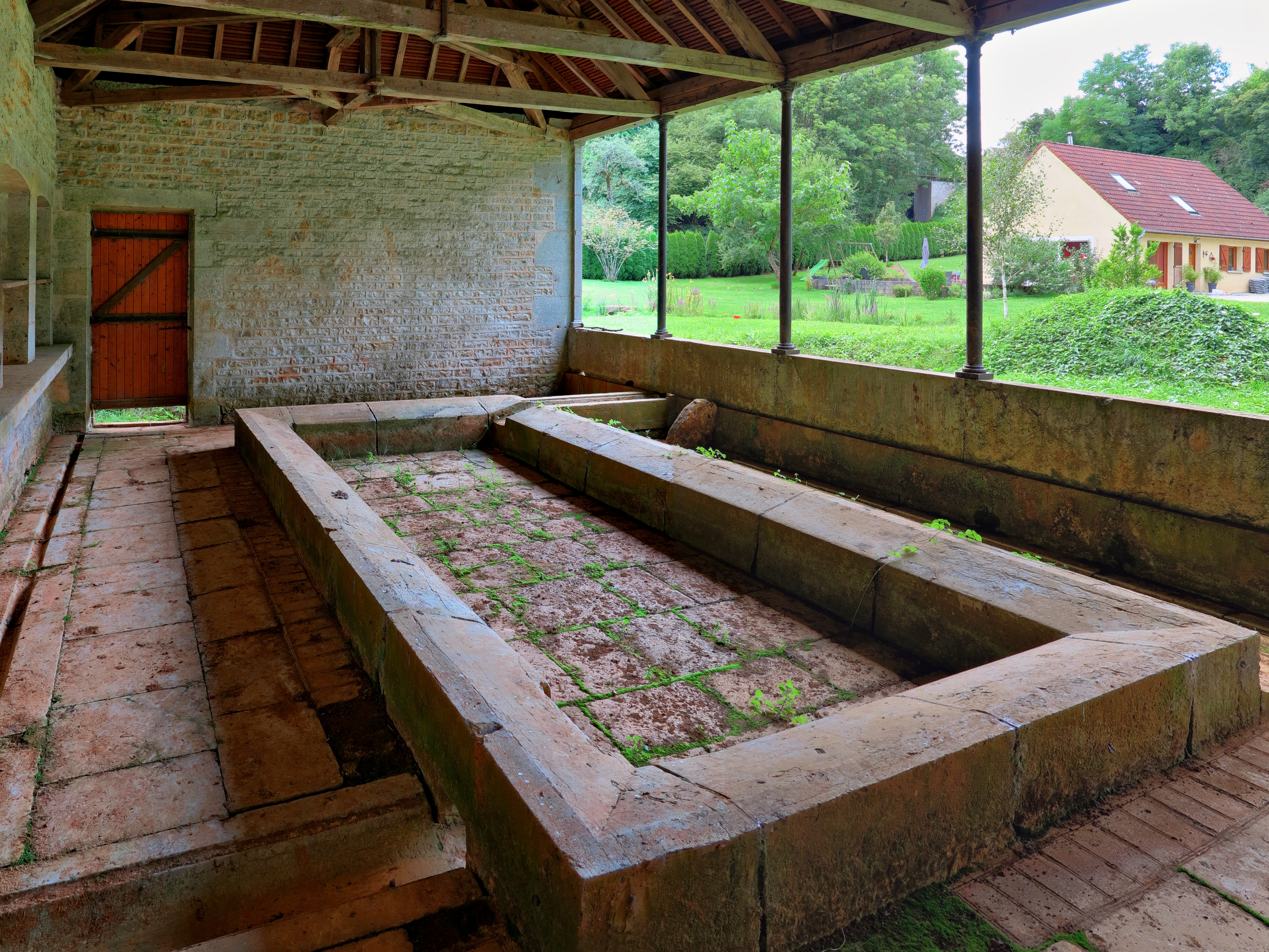 Le lavoir